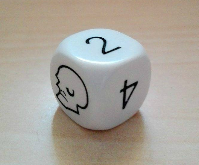 Dado di Drizzit che raffigura Gregorius da me fotografato.